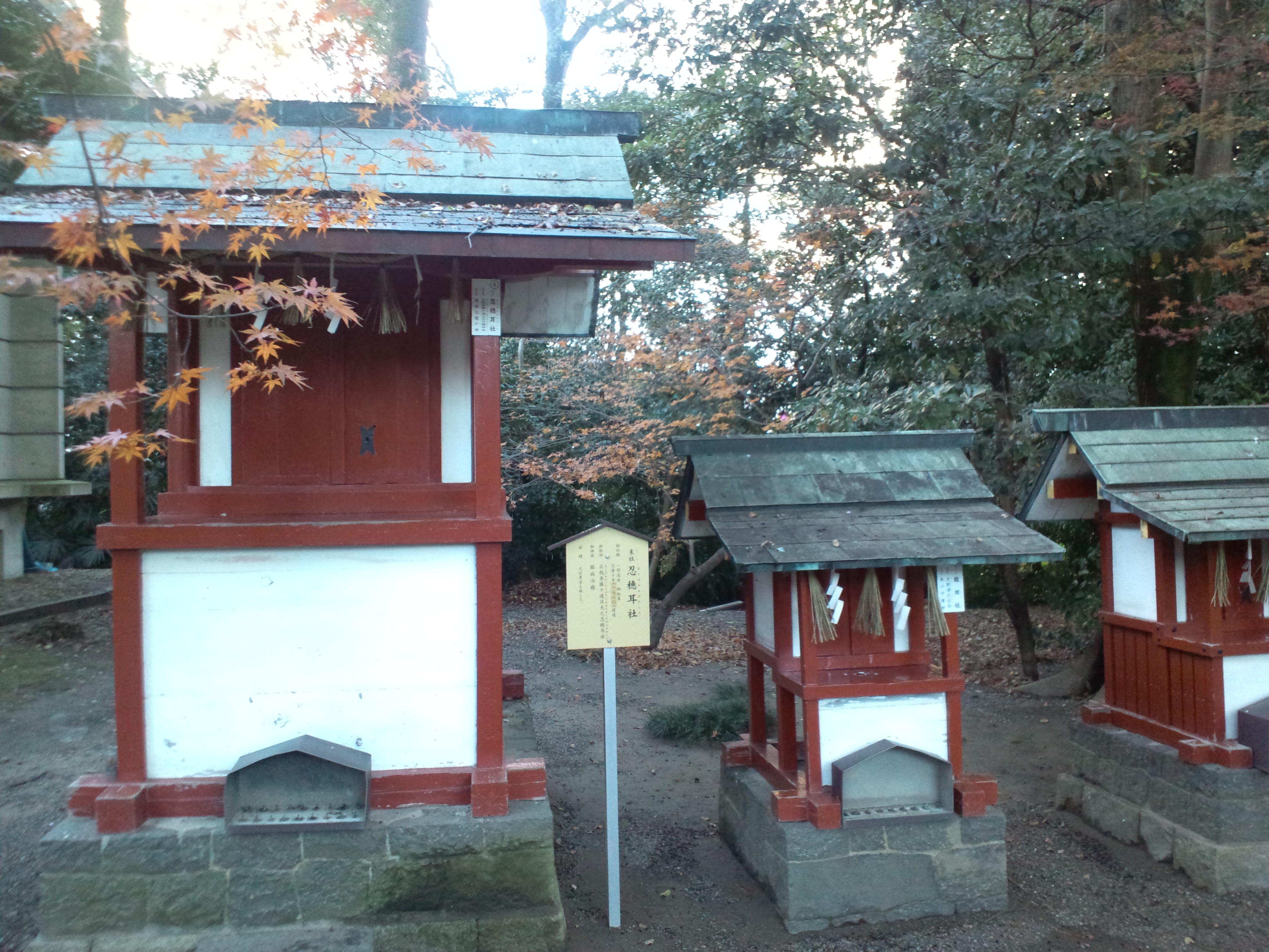 津島神社忍穂耳社